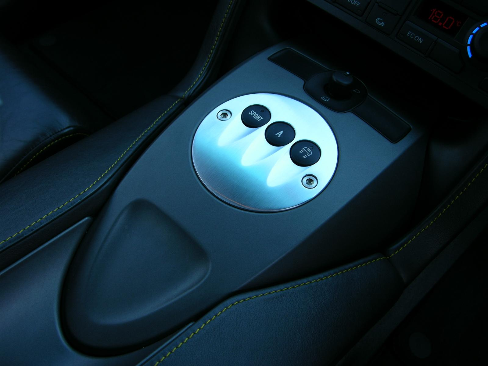 Lamborghini Gallardo Coupe E-Gear